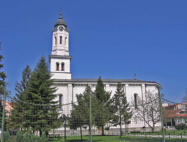 Serbian Orthodox Church of Obrenovac, near Belgrade, Serbia/L'église orthodoxe serbe d'Obrenovac, près de Belgrade, Serbie